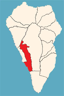 Localización del Municipio de Los Llanos de Aridane